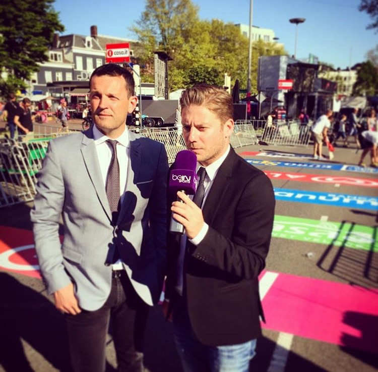 Emmanuel BARTH au micro BeINSports